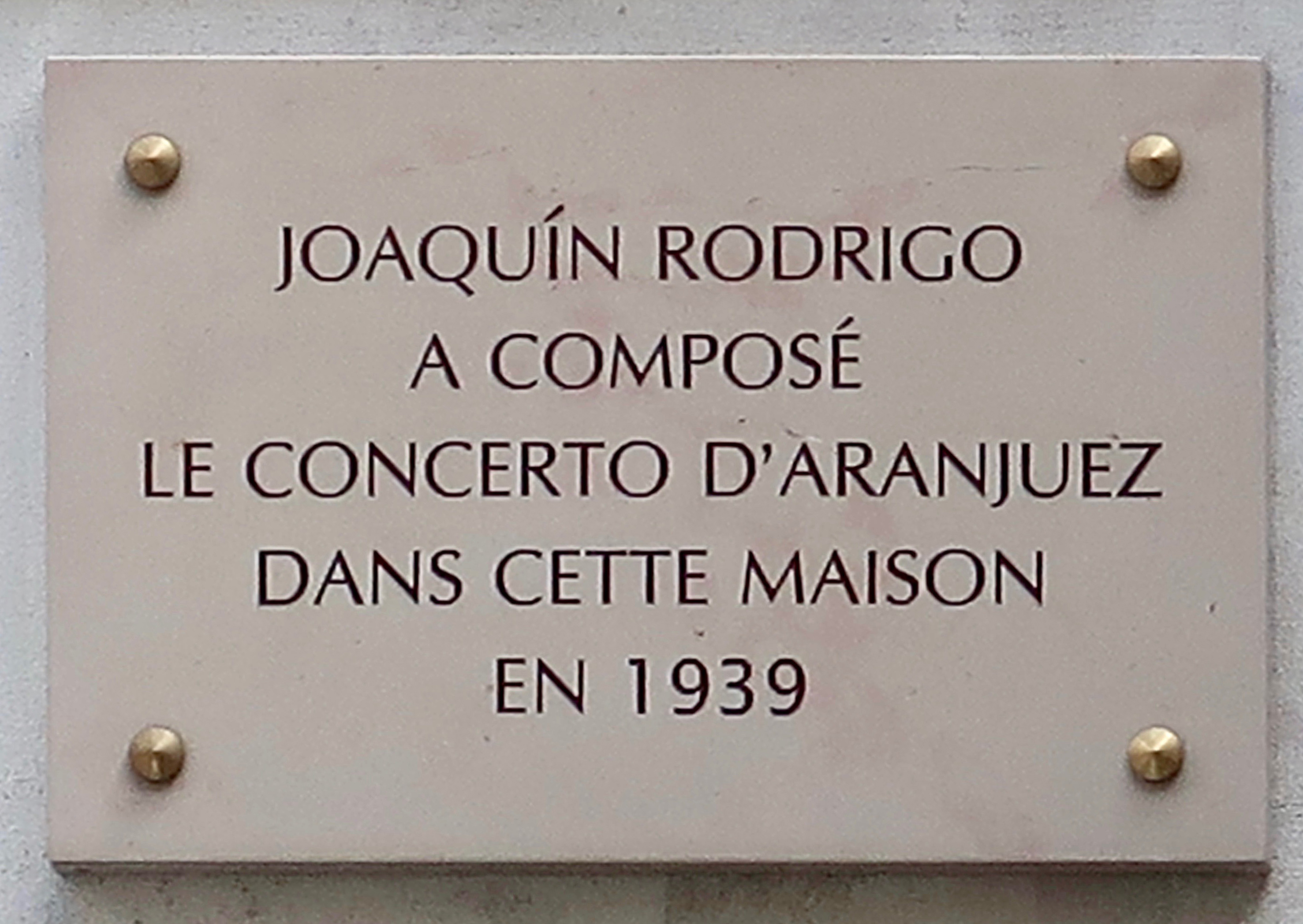 Plaque en hommage au compositeur Joaquín Rodrigo, 159 rue Saint-Jacques (Paris, 5e).